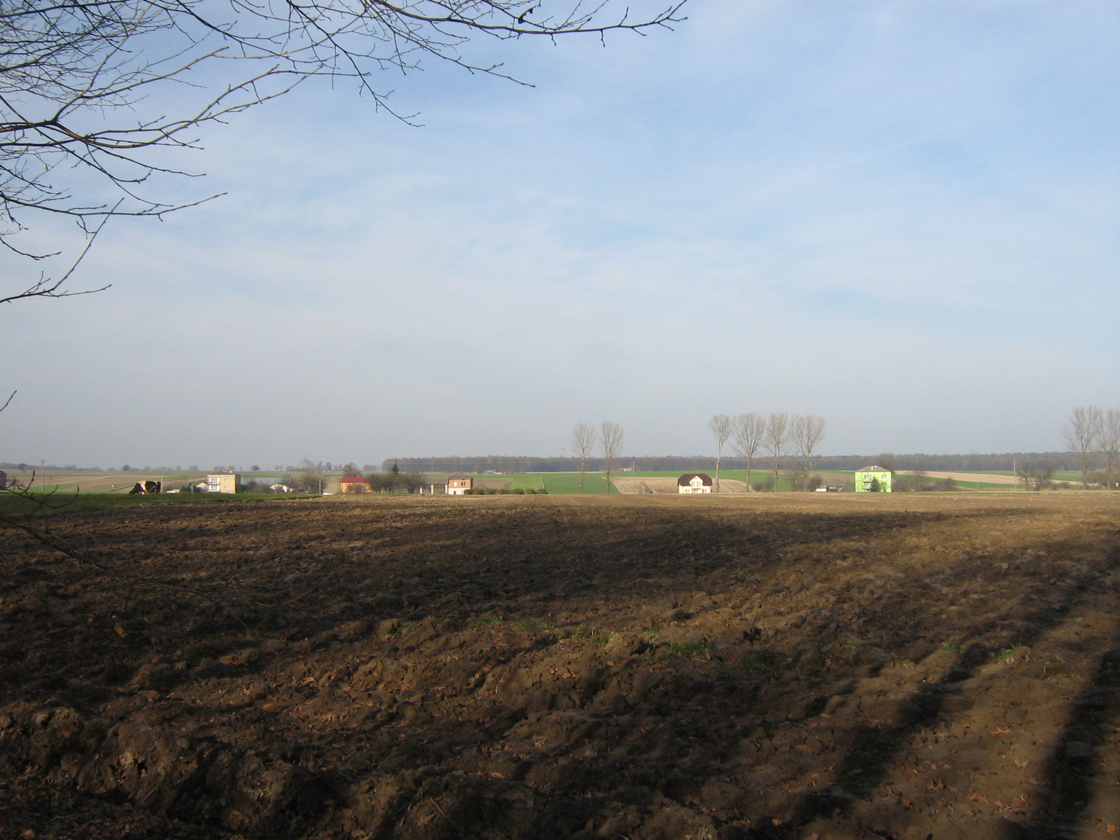 Osina